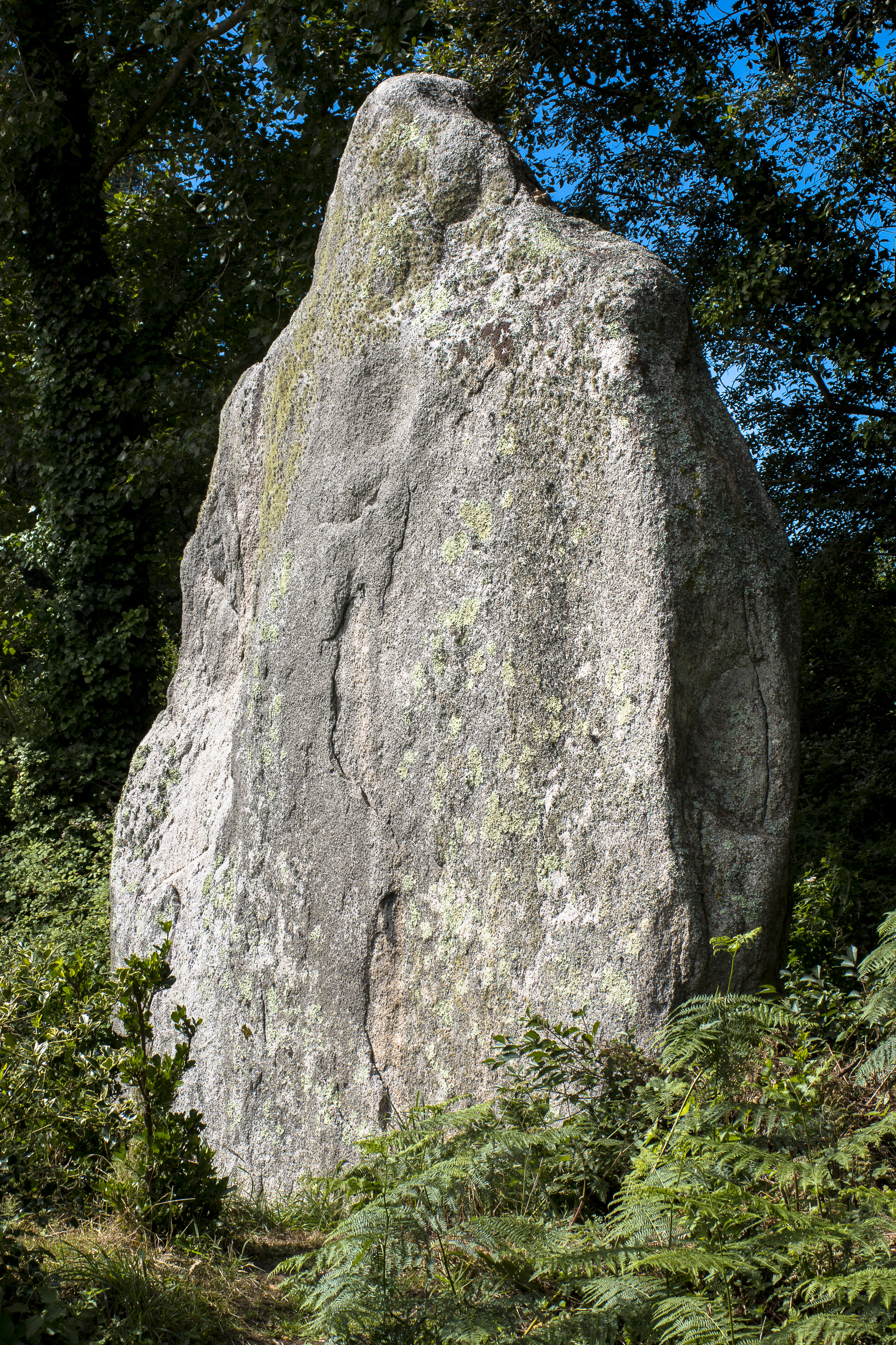 Menhir de Kerscaven (Penmarc'h)